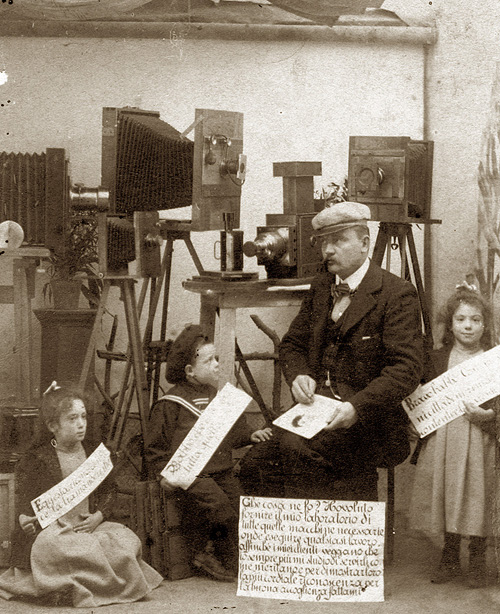 Alfonso Balelli ed i figli nello studio di Macerata, 1898